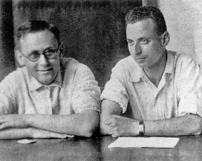 Александр Ахиезер и Ласло Тисса во время работы в Украинском физико-техническом институте, 1936 год.